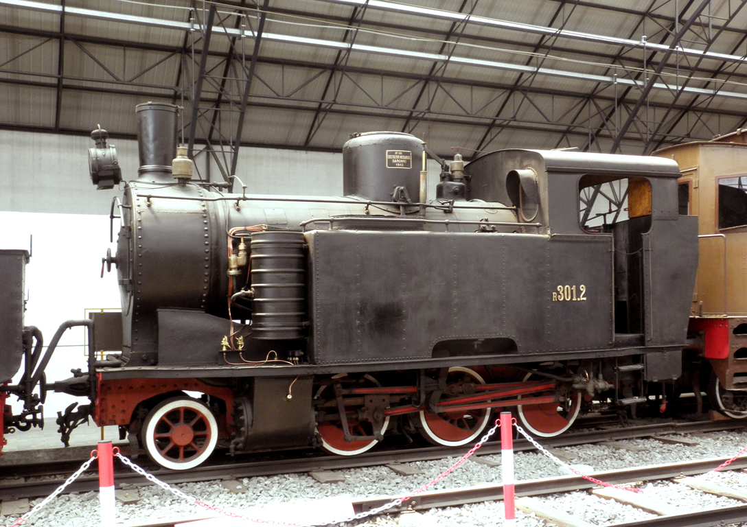 Locomotiva a vapore gr. R.301 delle Ferrovie dello Stato, conservata al Museo della Scienza e della Tecnologia di Milano